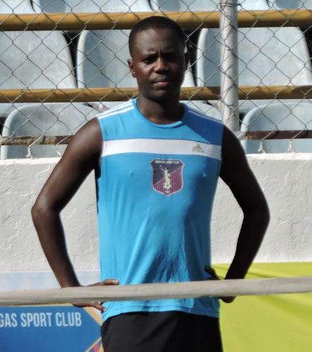 Entrenando